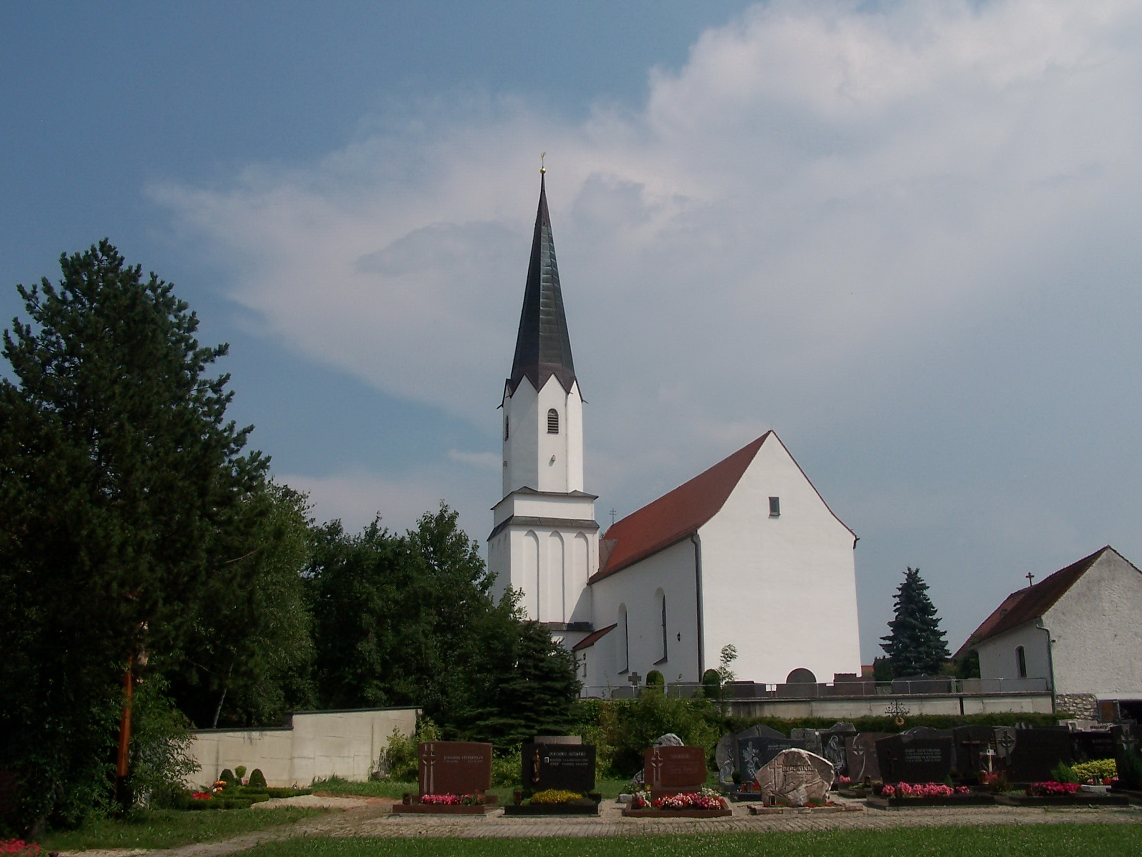 Rottenburg an der Laaber. Gisseltshausen. Langhaus im Kern spätromanisch, barocker Ausbau in der 1. Hälfte 18. Jahrhundert, Turmobergeschoß 19. Jahrhundert; mit Ausstattung; Friedhofsummauerung 18. Jahrhundert.